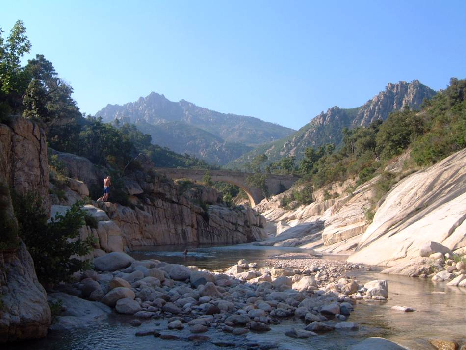 Pont sur la rivière Cavo en Corse du Sud